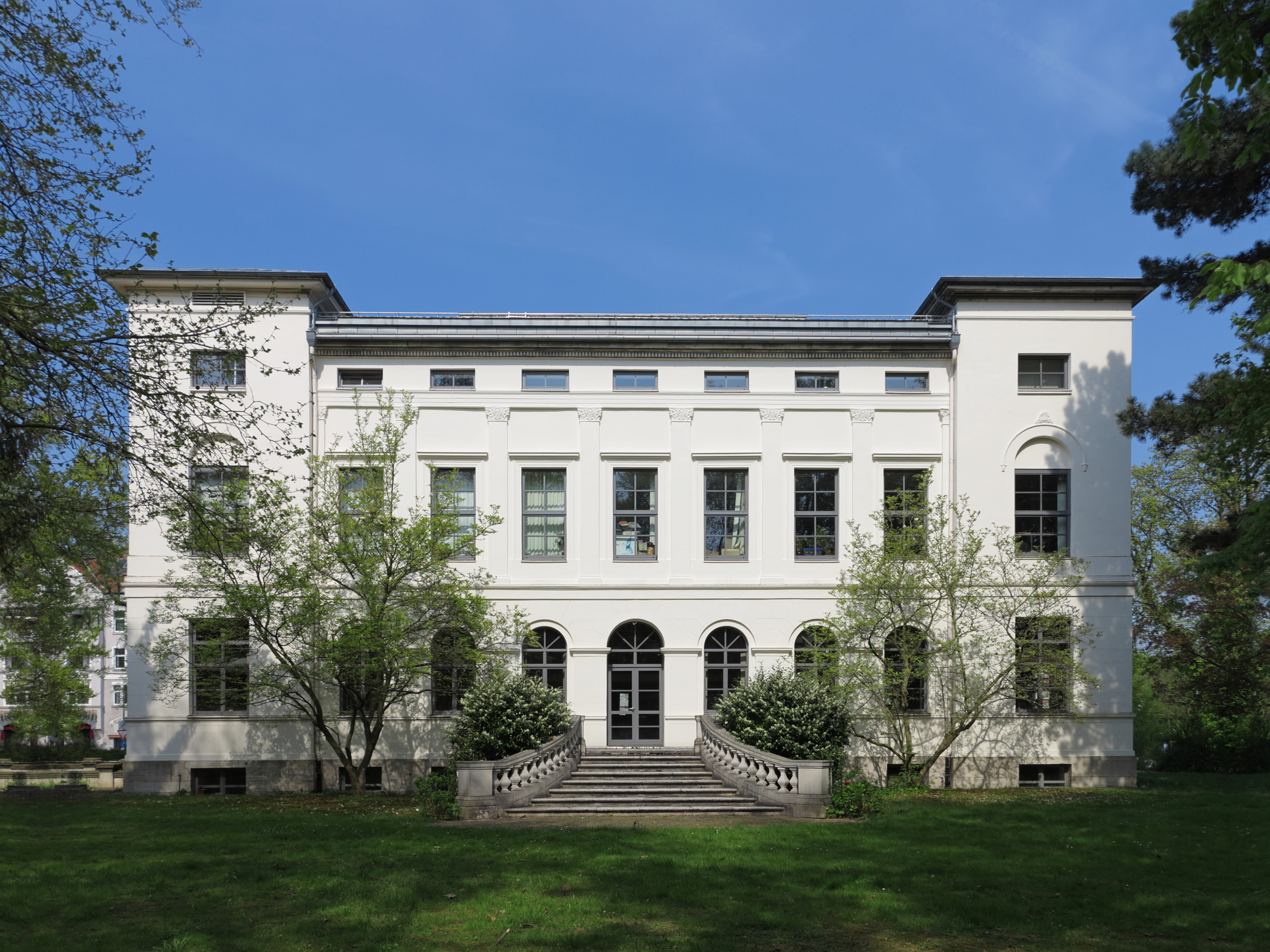 Braunschweig: die Parkseite der Villa von Bülow